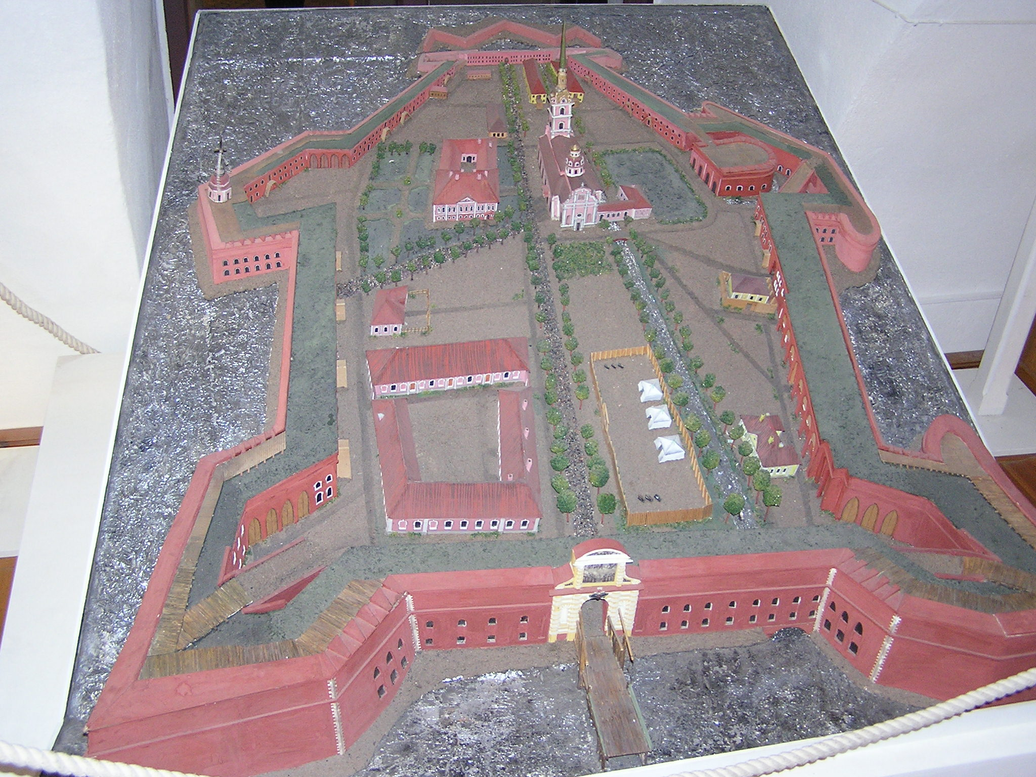 Санкт-Петербург. Петропавловская крепость. Макет Петропавловской крепости